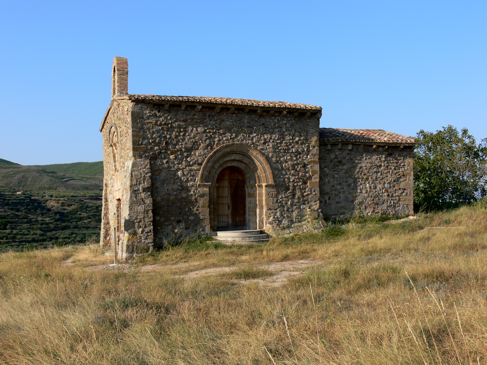 Ermita de la Virgen del Plano en Leza de Río Leza, La Rioja - España.